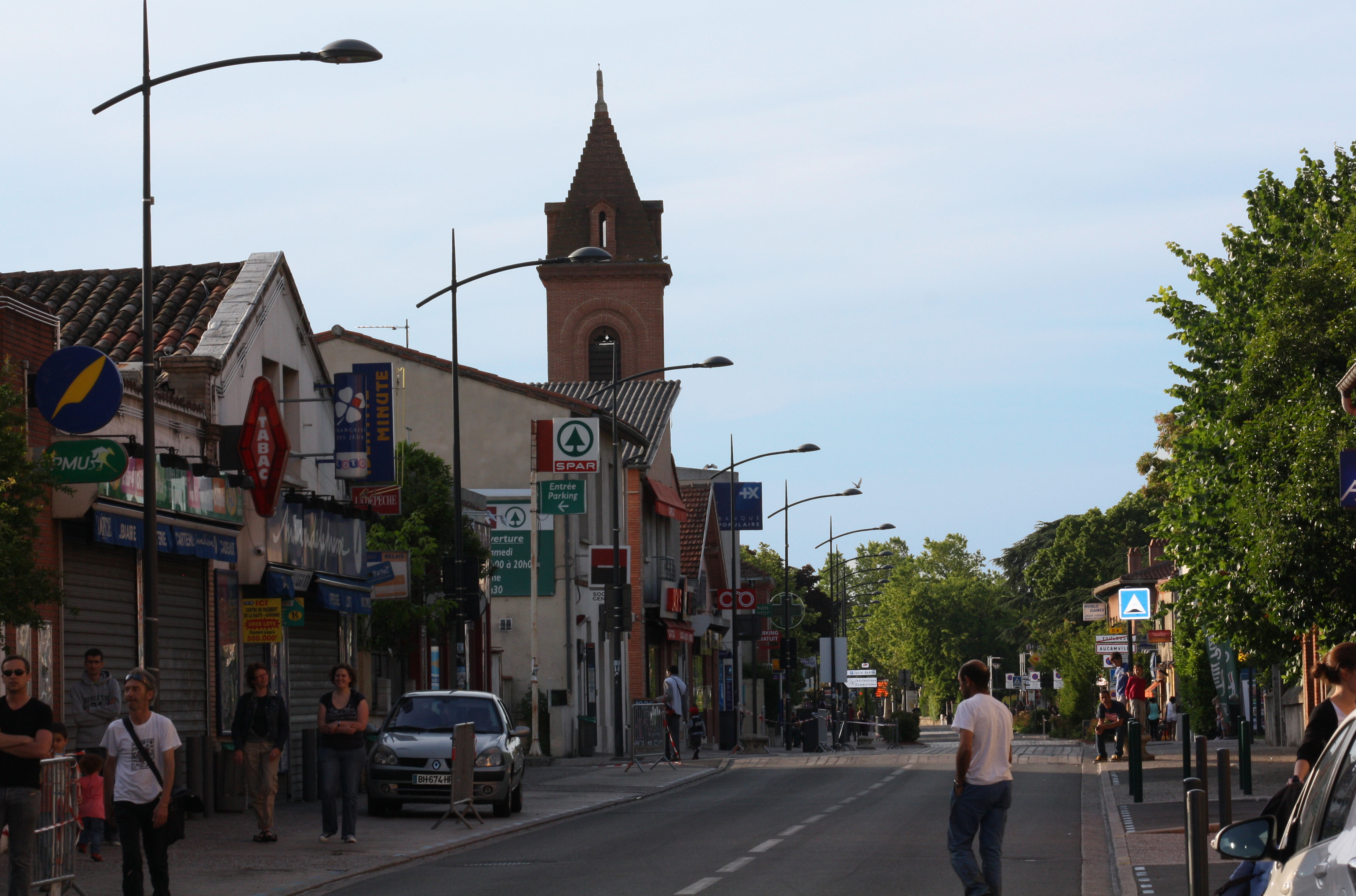 Aucamville (Haute-Garonne, France) - Route de Fronton dans le centre-ville.